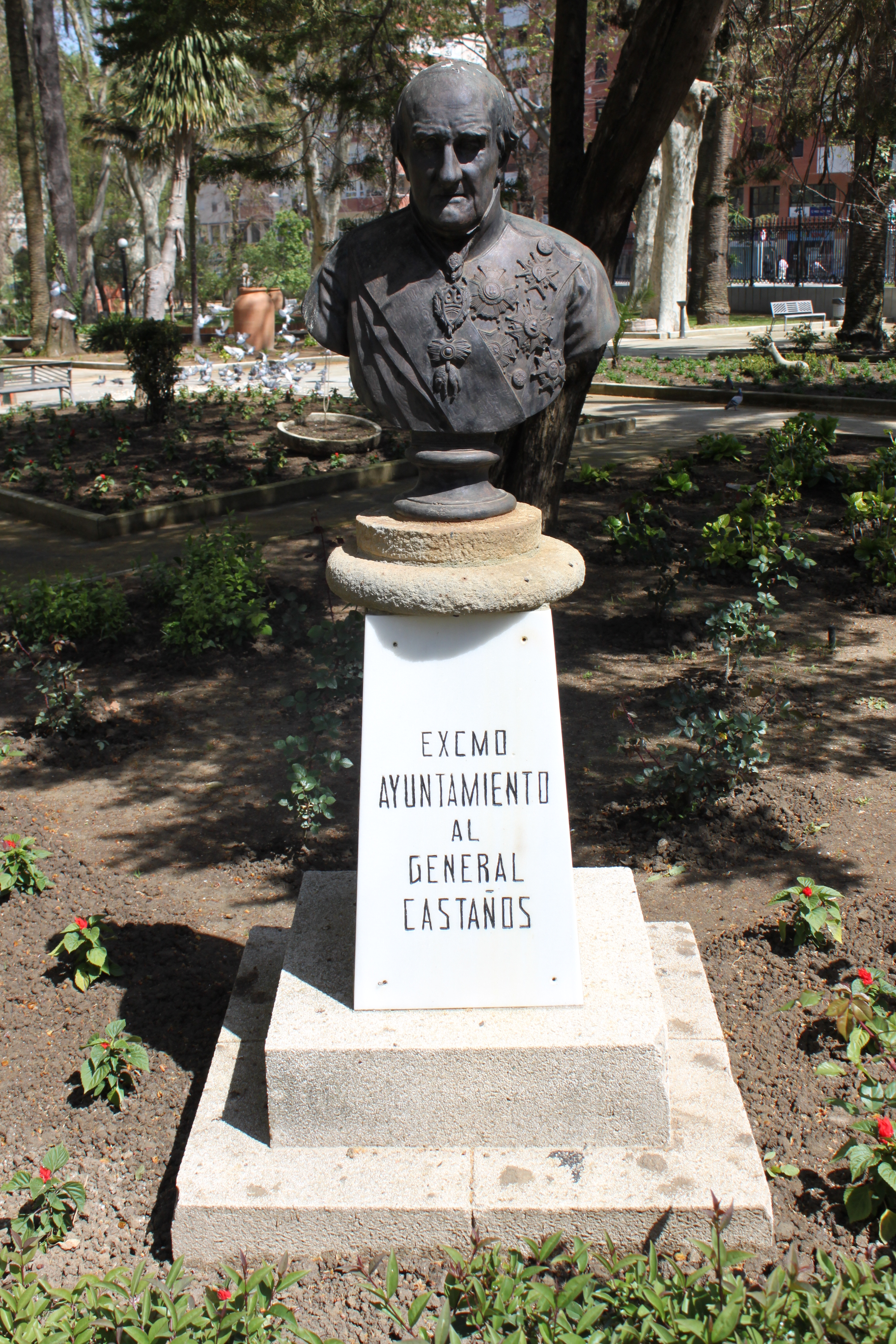 Busto del general español Francisco Javier Castaños situado en el Parque María Cristina de la ciudad de Algeciras, en Andalucía, (España). Es una reproducción de 1948 del busto en bronce realizado en 1853 por Josep Piquer y Duart basado a su vez en un retrato de Vicente López Portaña.